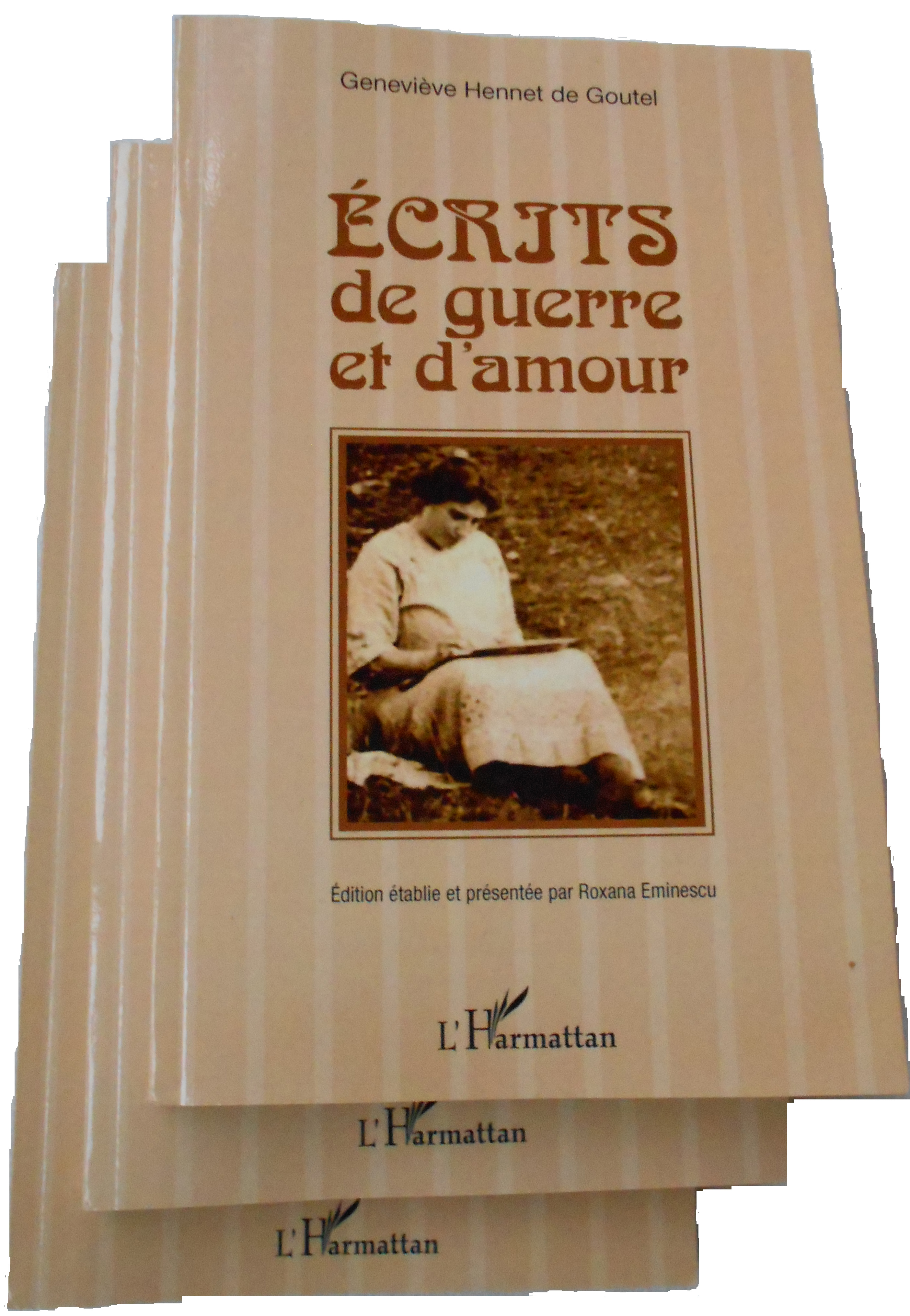 livre